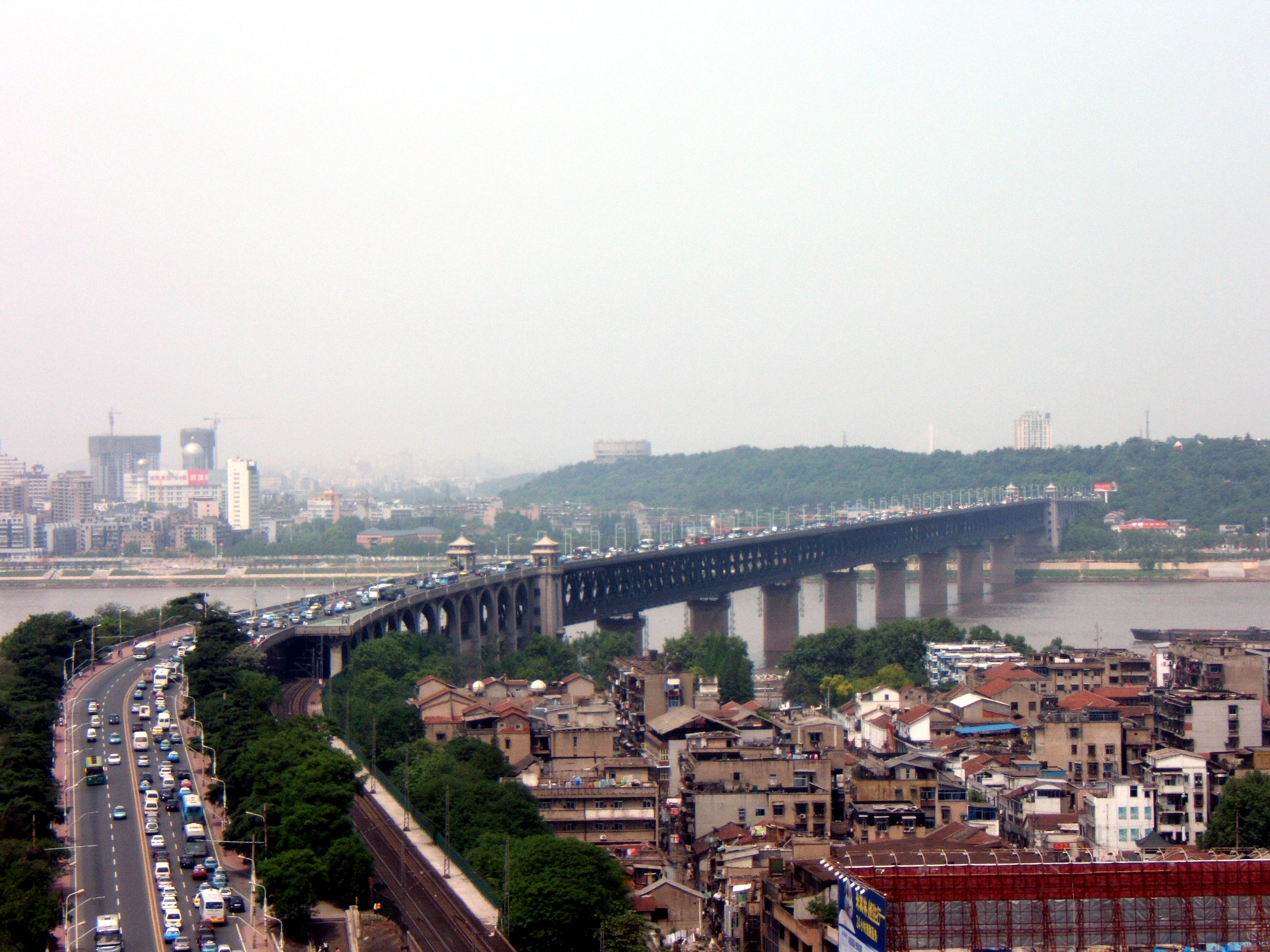 中文（中国大陆）: 武汉长江大桥，摄于黄鹤楼上。